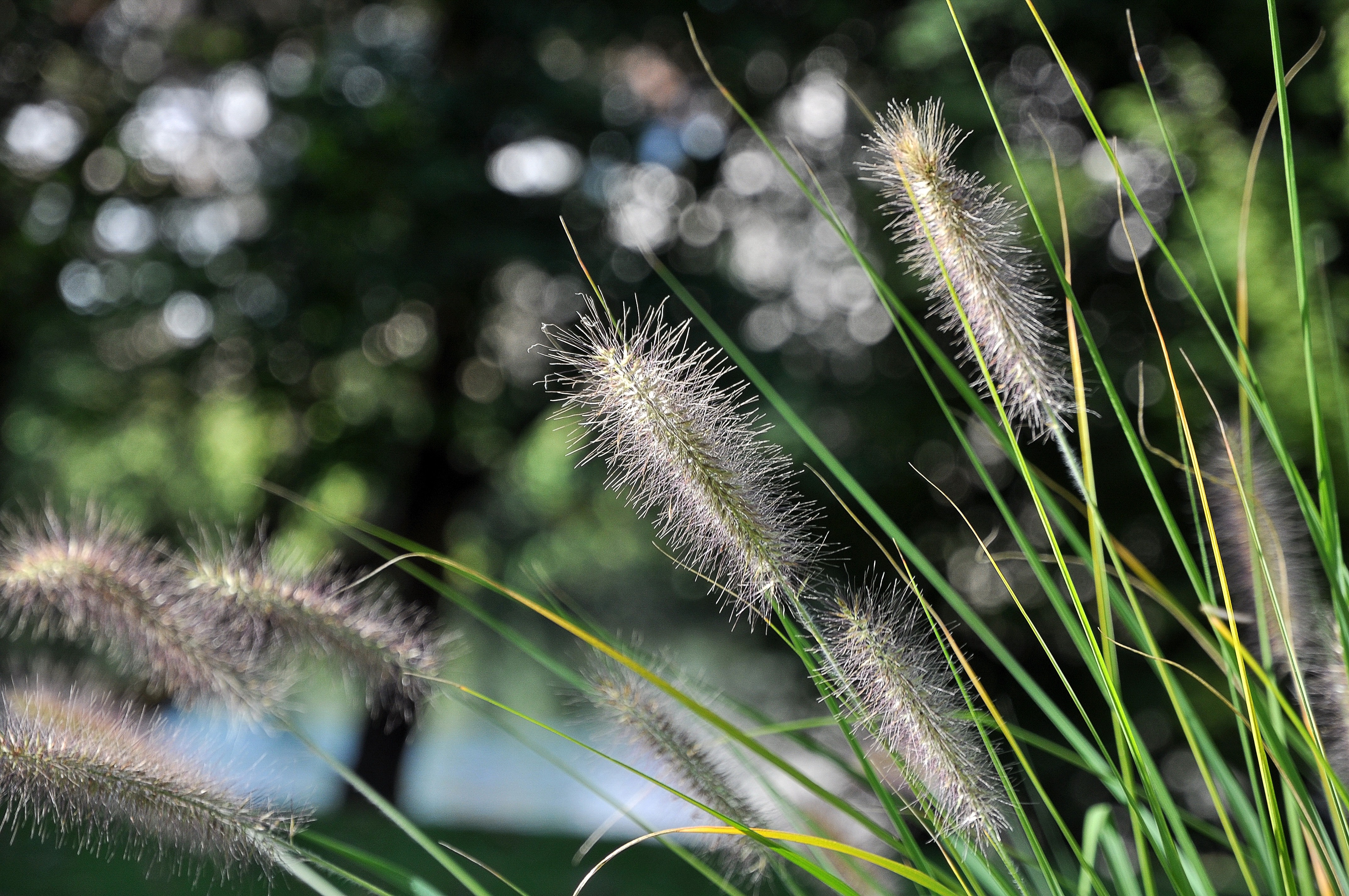 Pennisetum alopecuroides (herbe aux écouvillons) - nombreux cultivars.